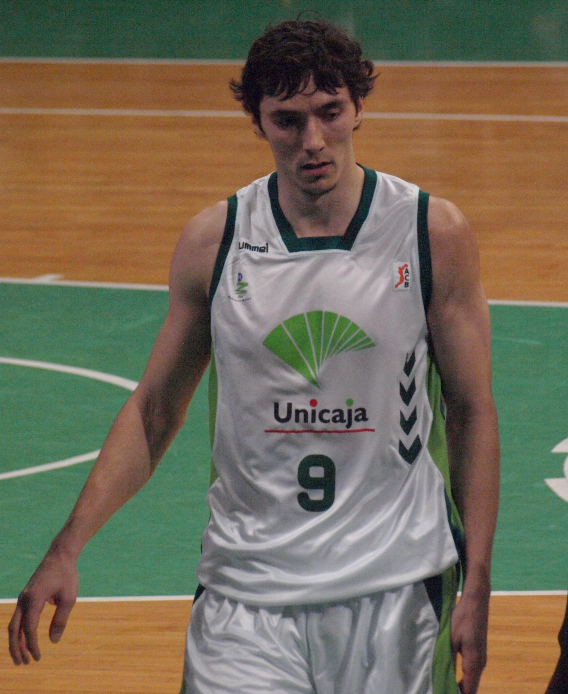 Jiri Welsch en el partido que enfrentó al al Unicaja Málaga y al DKV Joventut de liga ACB en el Olímpico de Badalona en 2009